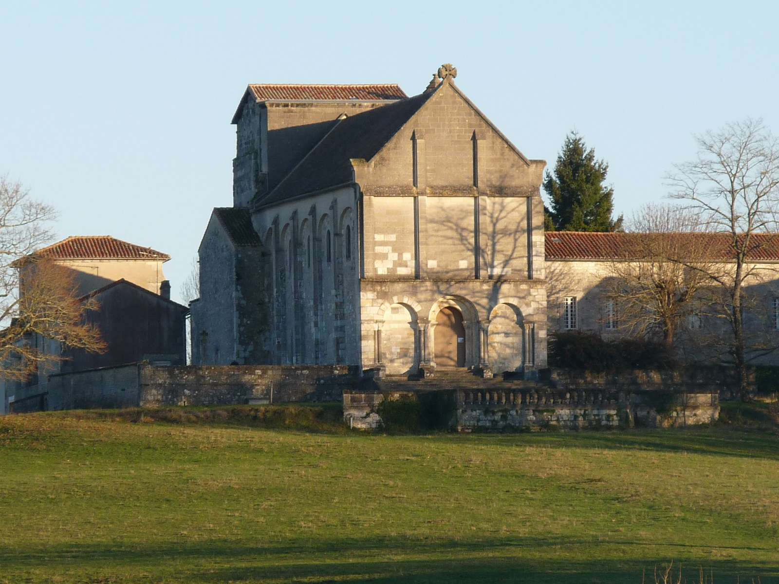 abbaye de Puypéroux, Aignes-et-Puypéroux, Charente, France